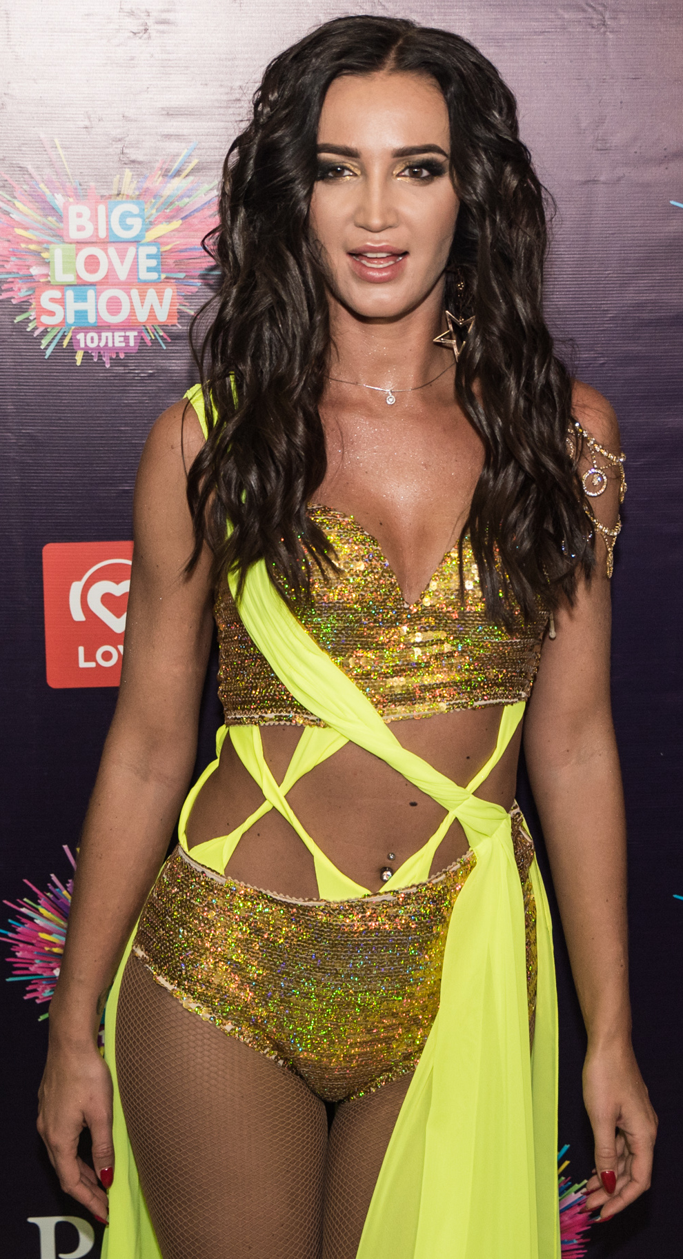 Ольга Бузова на прессволе на Big Love Show 2018 в СПб